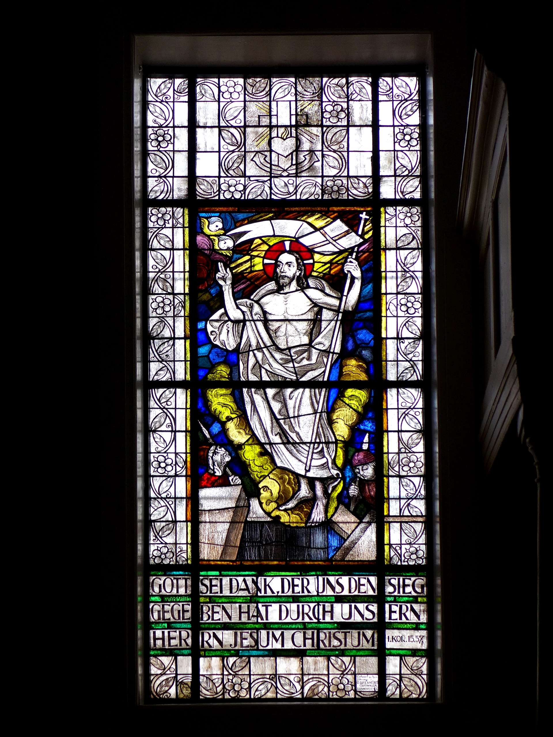 Bleiverglastes Fenster und Glasmalerei in der St. Remigius Kirche zu Suderburg. Entwurf und Ausführung: O. Brenneisen, Glasmaler, Hannover, 1946.